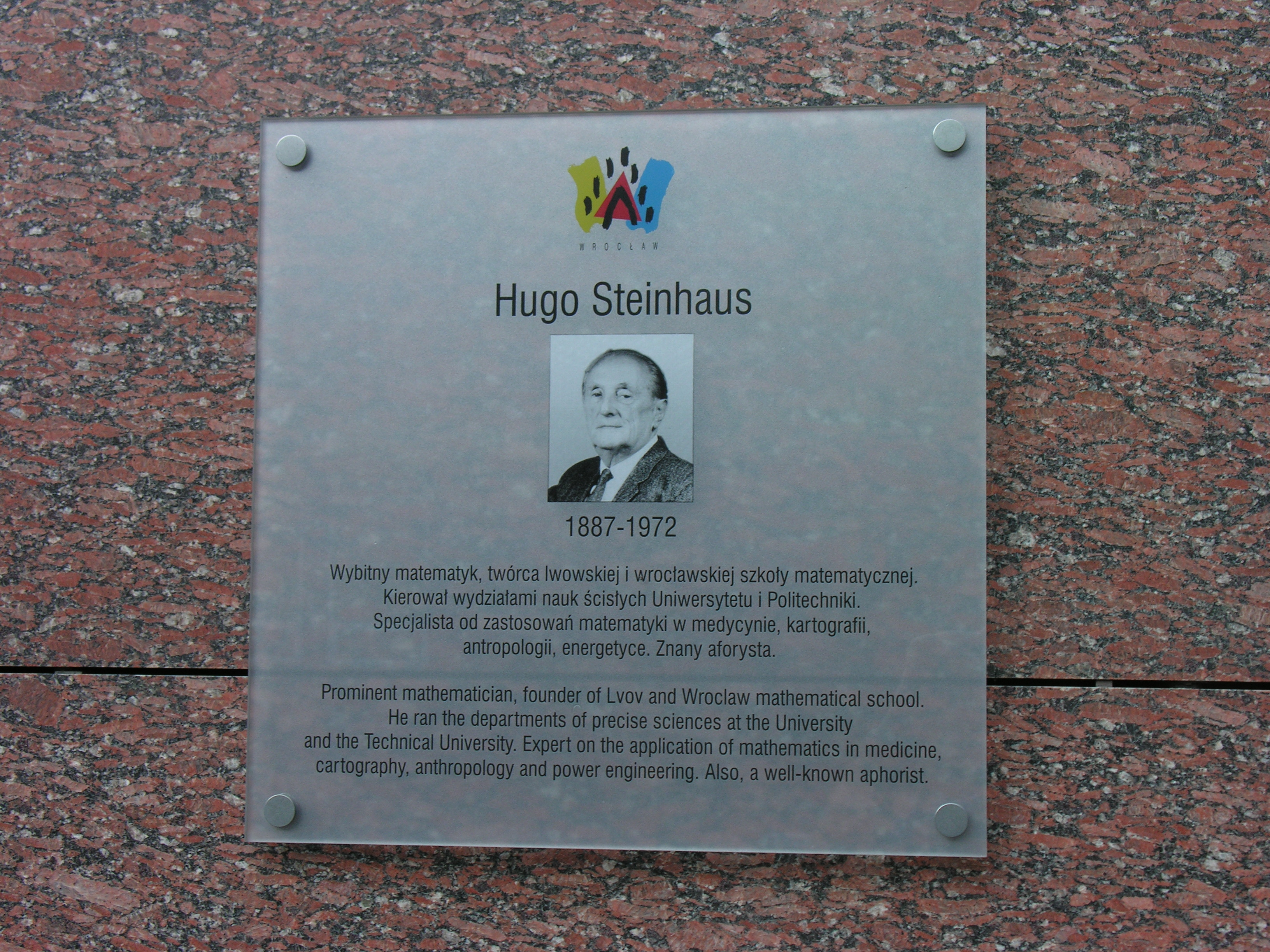 Tablica ku czci Hugo Steinhausa we Wrocławiu, ul. Janiszewskiego 14 A